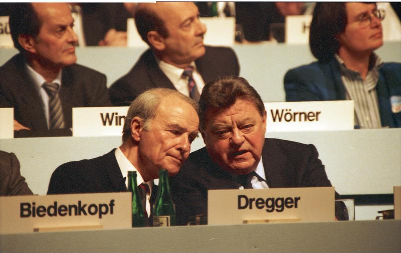 4.1.1987 Wahlkampf-Großveranstaltung der CDU mit Bundeskanzler Kohl und dem CSU-Vorsitzenden Franz Josef Strauß in der Dortmunder Westfalenhalle.